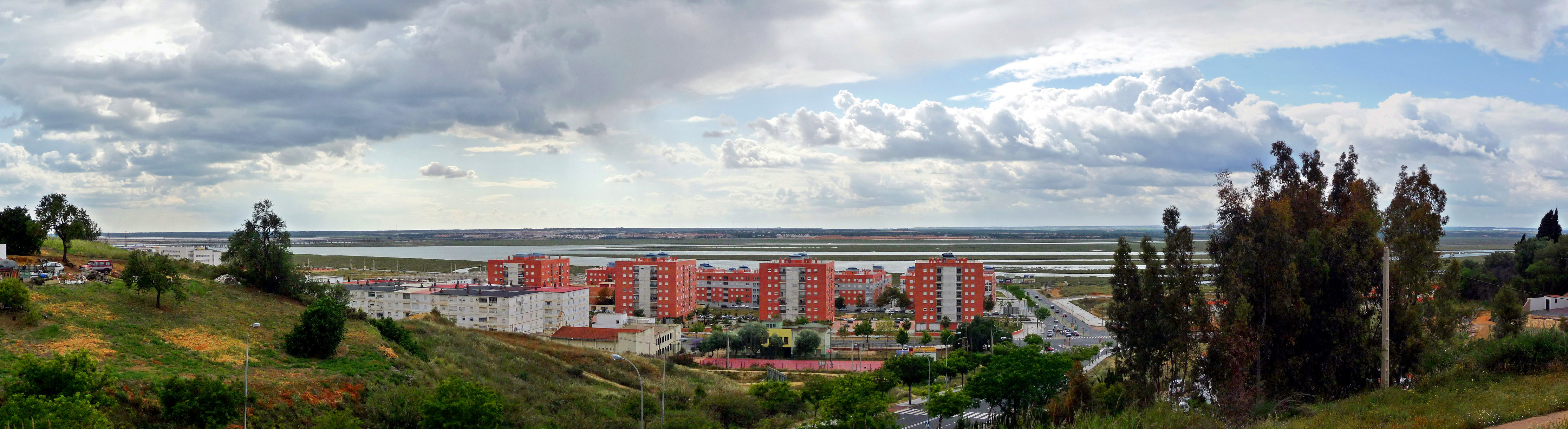 Cabezos de El Conquero (Huelva, España)